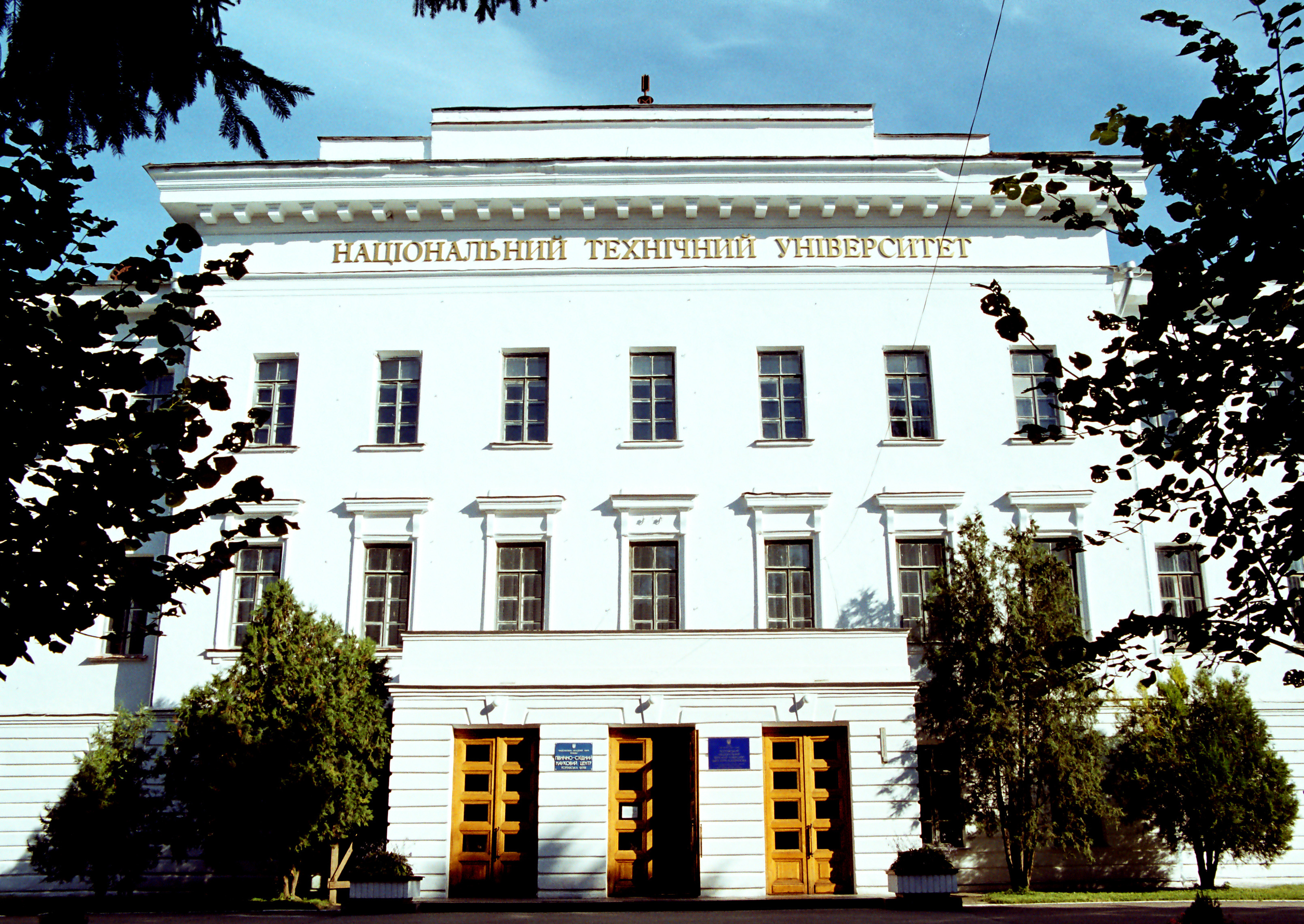 Інститут шляхетних дівчат, Полтава, Проспект Першотравневий, 24